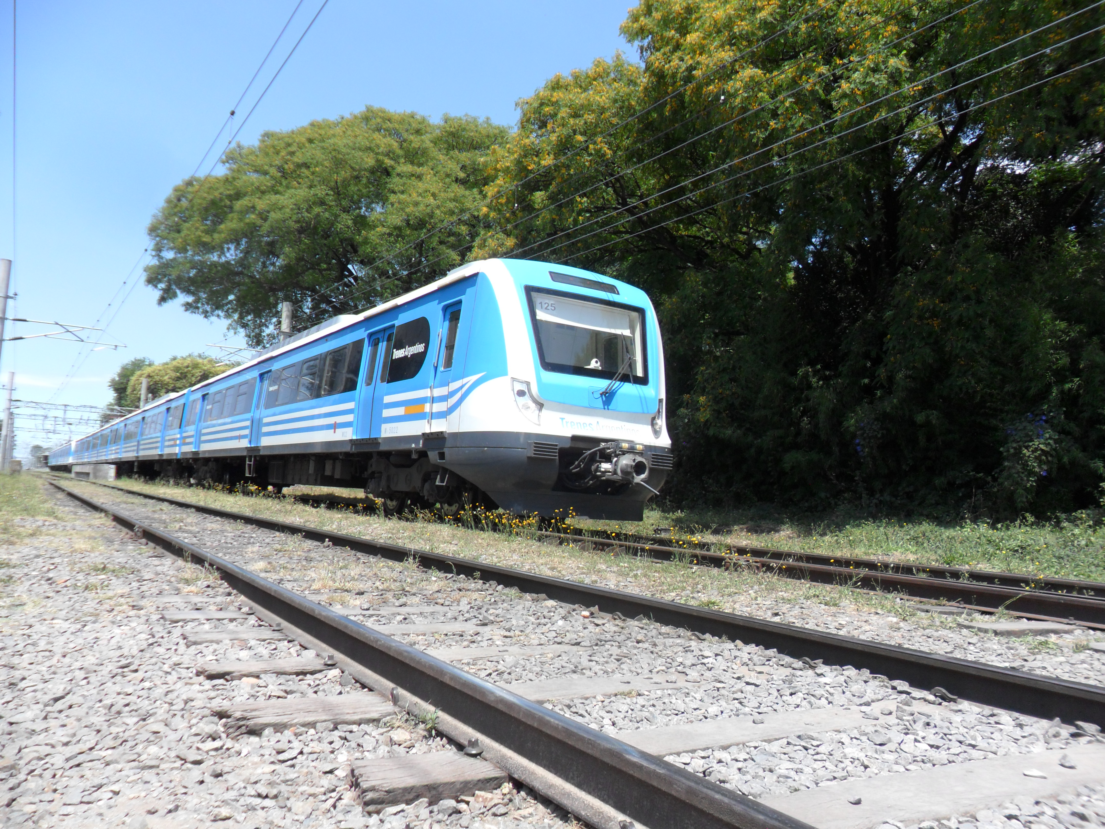 Tren eléctrico CSR saliendo de la estación Florencio Varela rumbo a Ardigo, 2017.